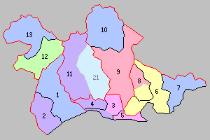 北海道釧路支庁の町村。